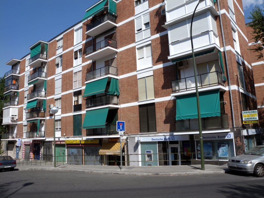 San Juan Bautista, 28043 Madrid, Spain